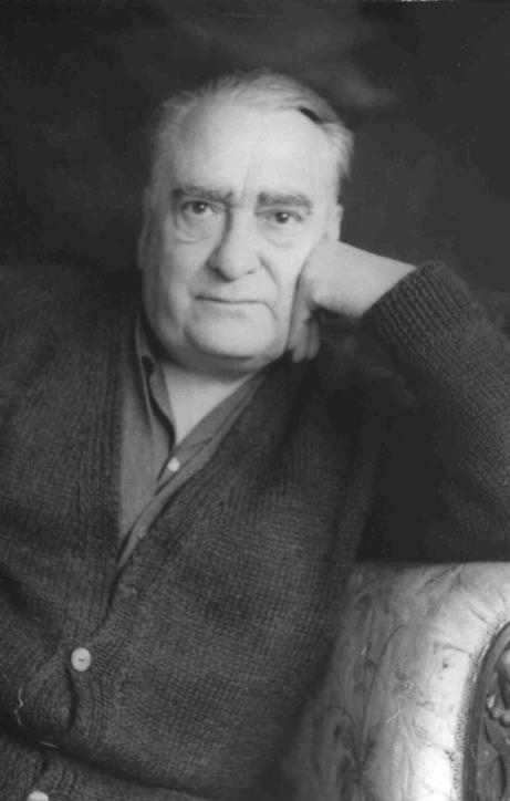 Hernán del Solar Aspillaga